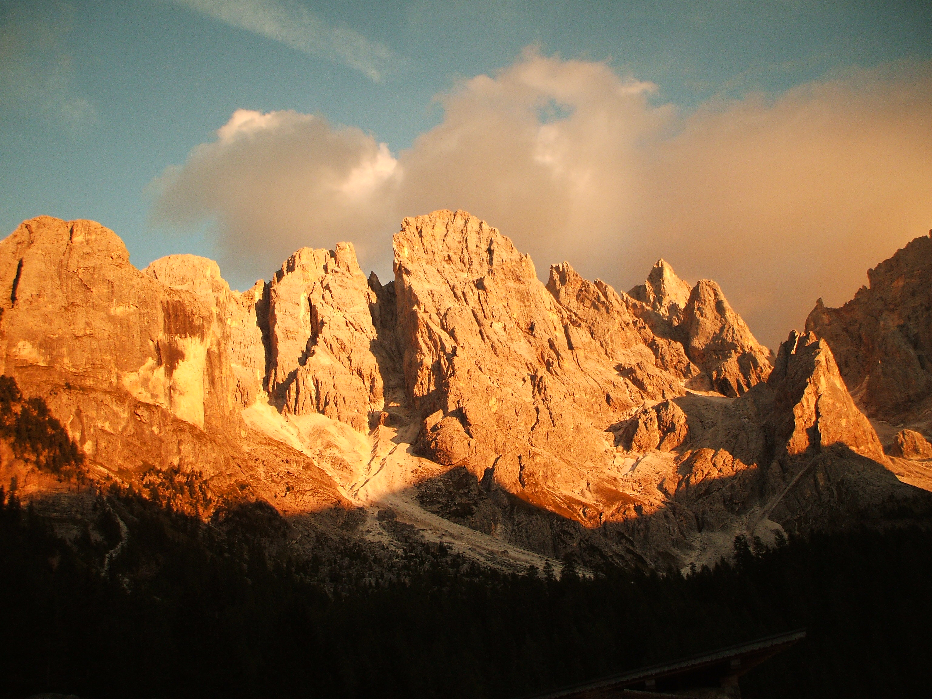 Sono l'autore della foto. Autore: Logudro. Data: 31/08/07. La foto riporta la cima dei Bureloni. La cima della Vezzana si trova a destra e nella foto non si vede che parzialmente, mentre il Cimon della Pala non si vede affatto, essendo esso posto a destra della cima della Vezzana.